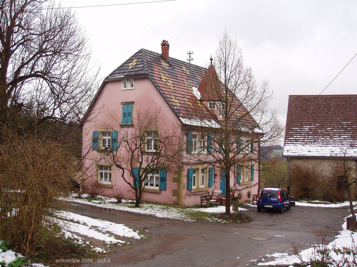 Anwesen mit markantem Türmchen in Möckmühl-Siegelbach